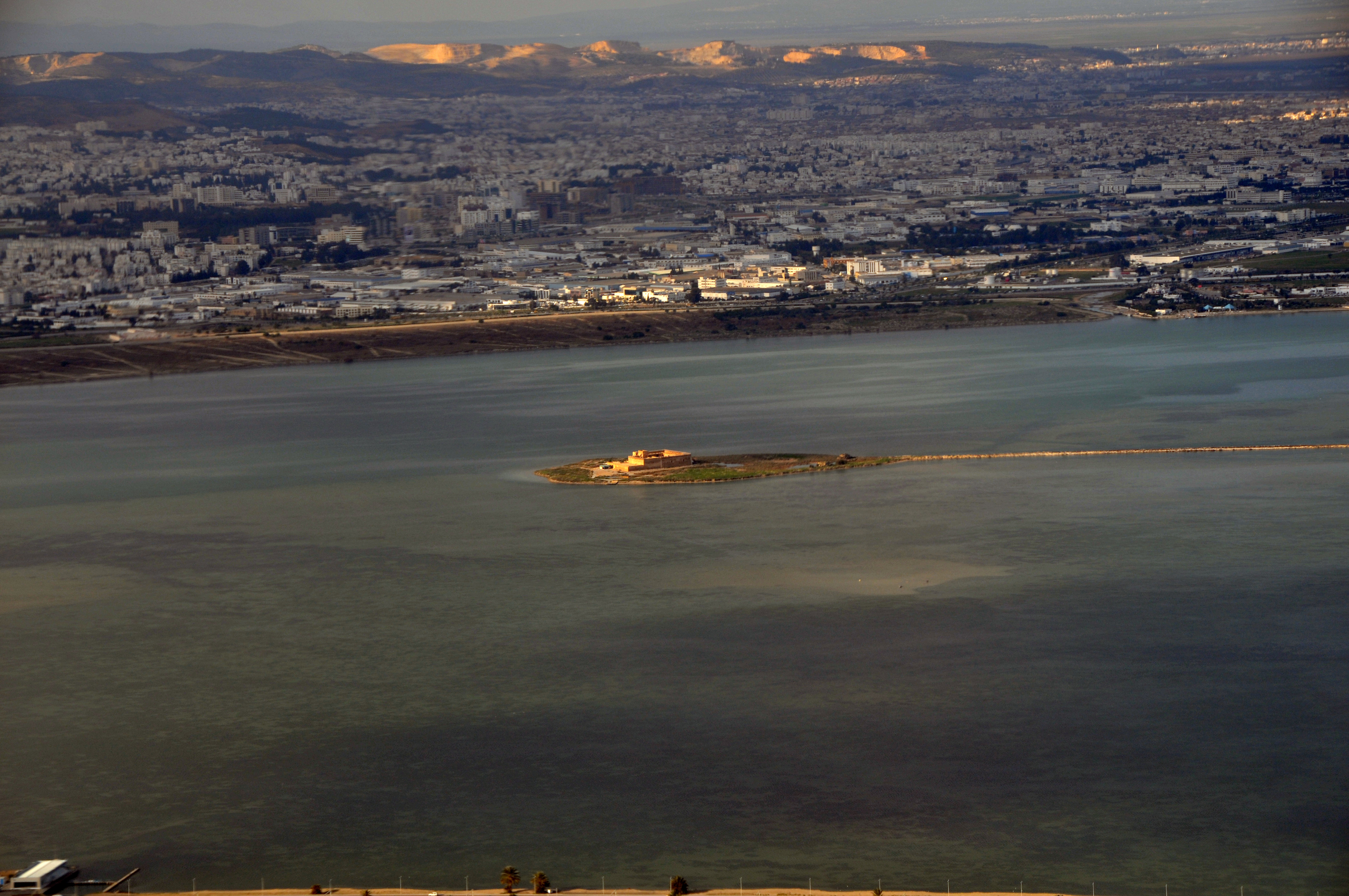 Ile Chikli dans le Lac de Tunis, Tunisie